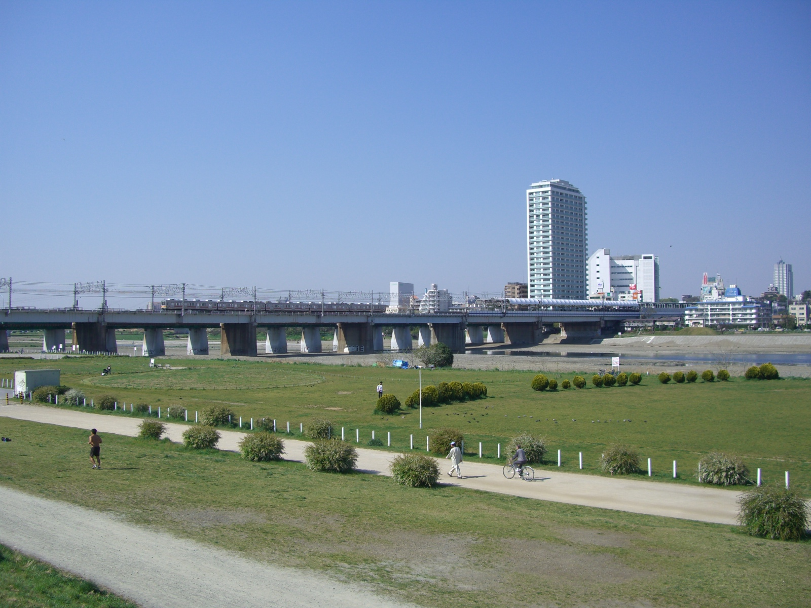 多摩川 二子玉川駅